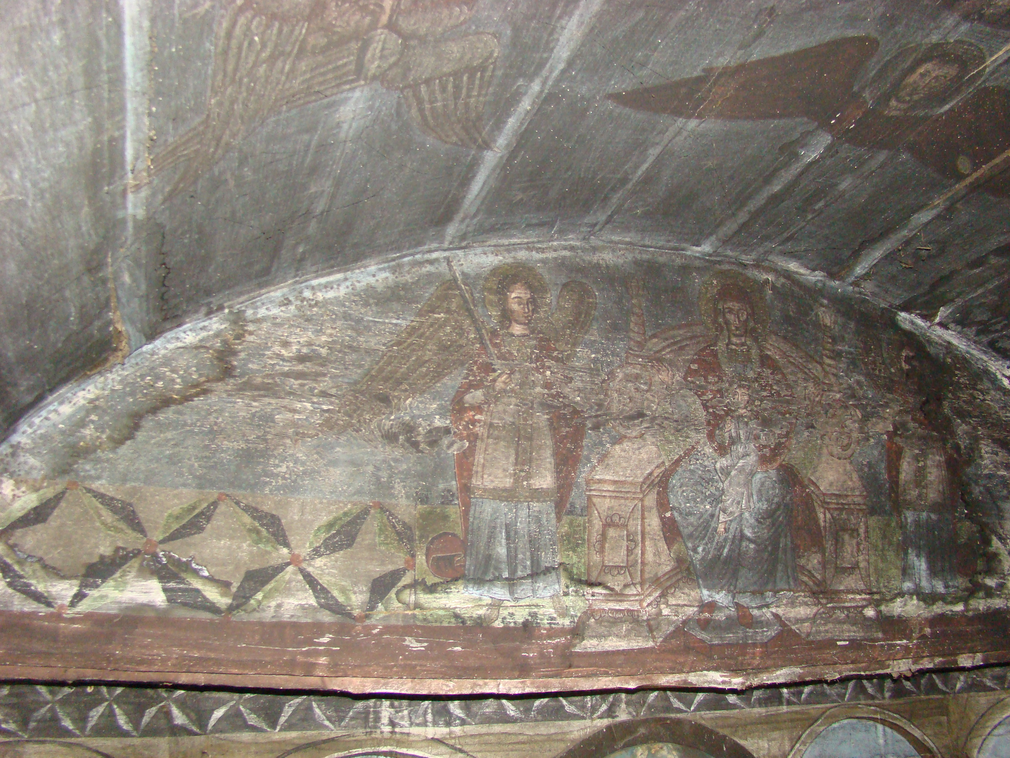 Biserica de lemn „Cuvioasa Paraschiva” din Rădulești